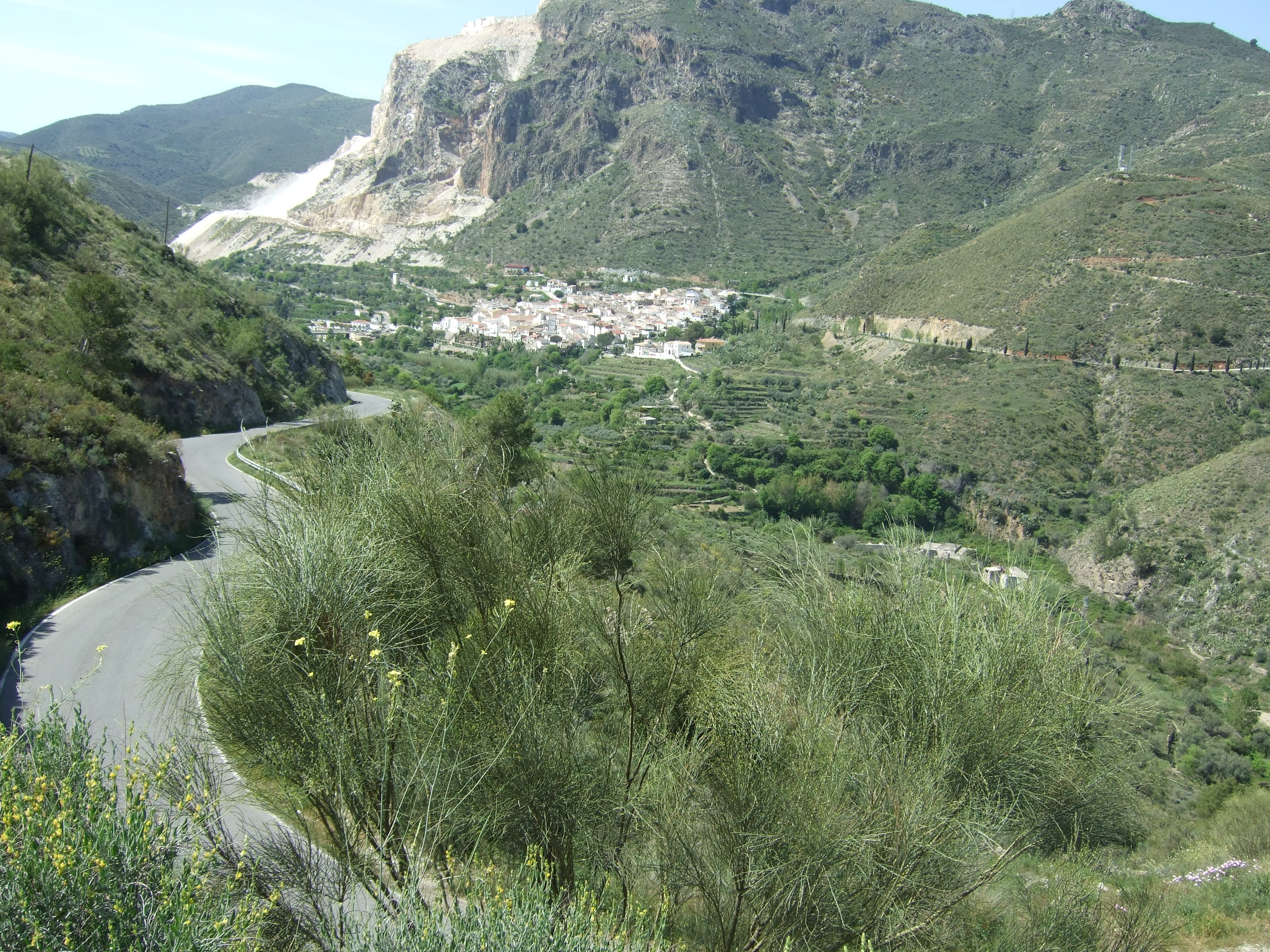 Corazón de Filabres